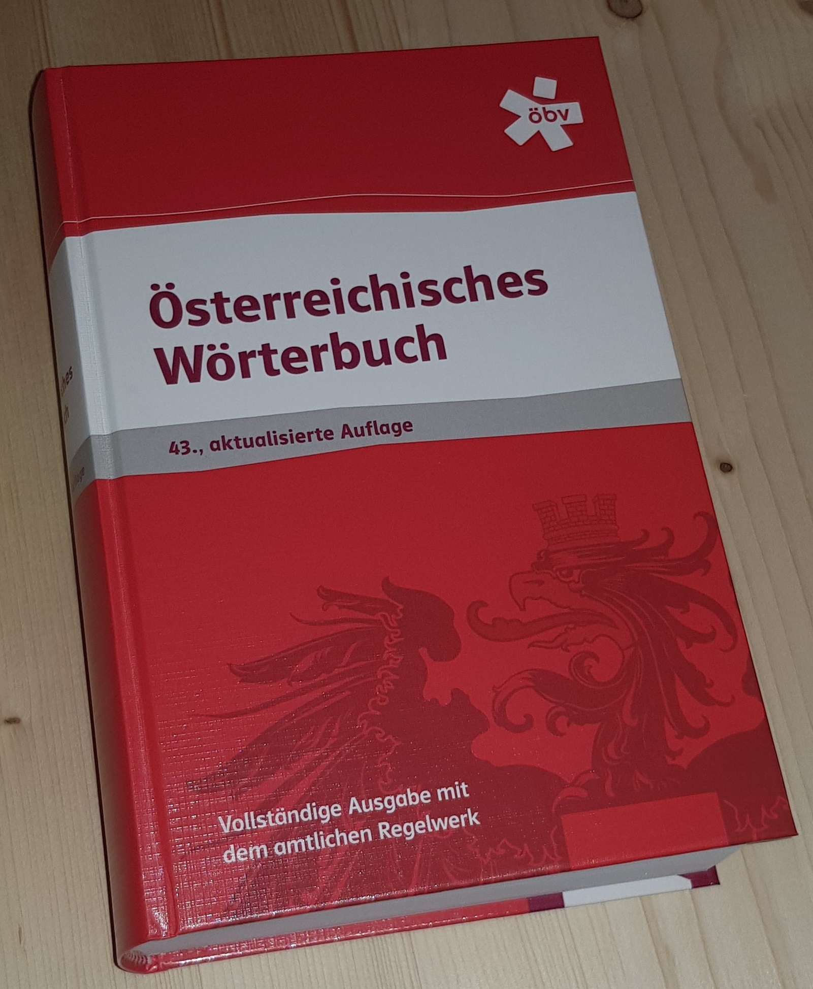 Deckel des Österreichischen Wörterbuches, 43. Auflage, Österreichischer Bundesverlag Schulbuch GmbH & Co. KG, Wien 2018.